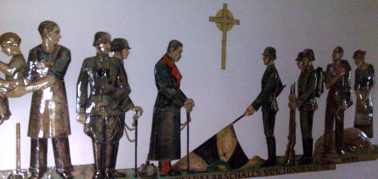 Hindenburgplastik in der blauen Kirche in Stetten am kalten Markt